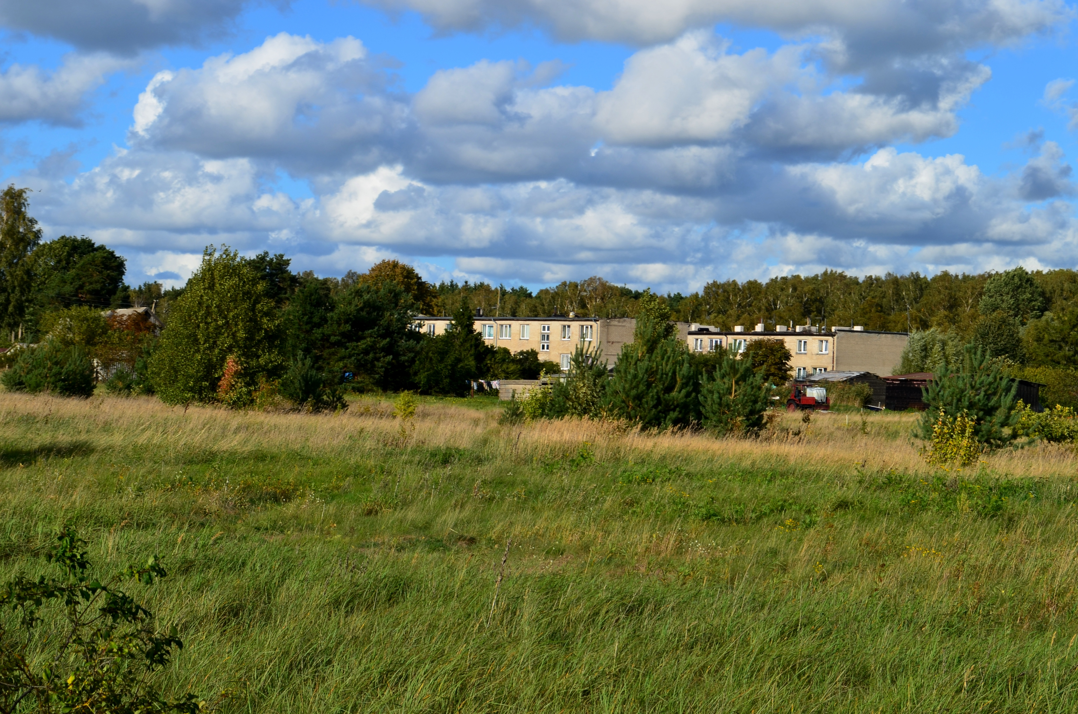 Svencelė, Klaipėdos raj.